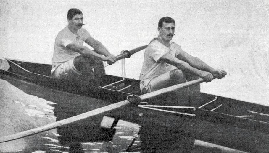 Lucien Martinet et René Waleff, de la société nautique de la Marne, champions de la Fédération parisienne en 1899.